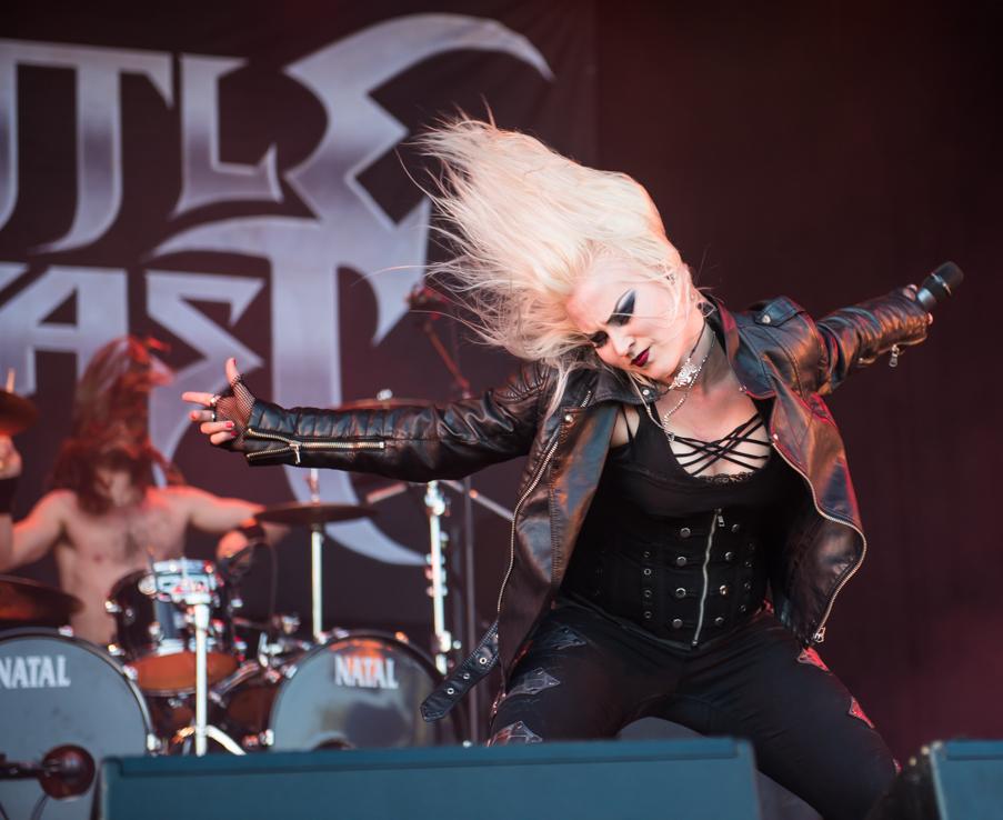 Sweden Rock Festivali 2015